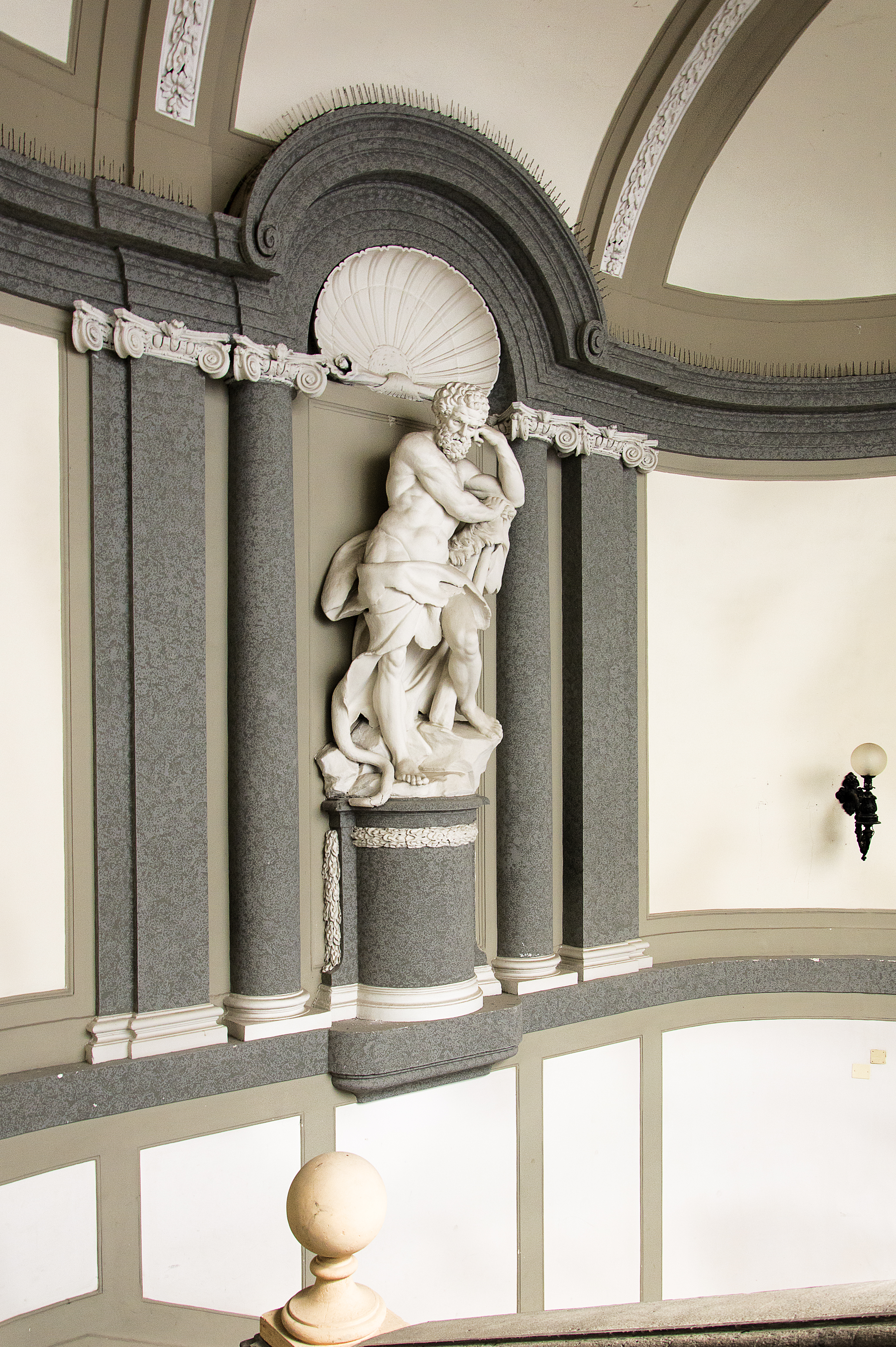 Palazzo Medici di Ottaviano: Facade